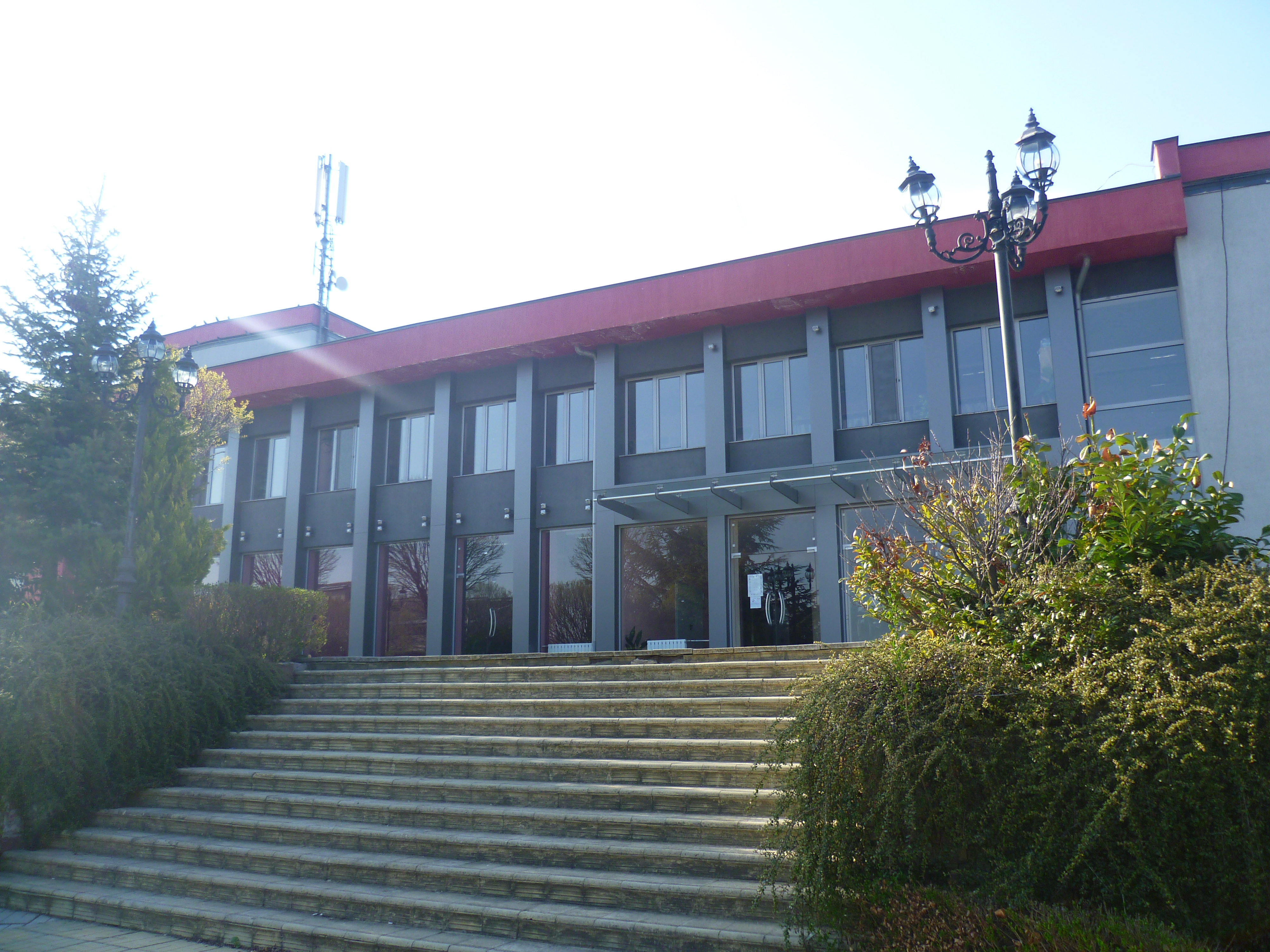 Народно читалище "Просветен лъч-1905" се намира в центъра на гр. Сапарева баня